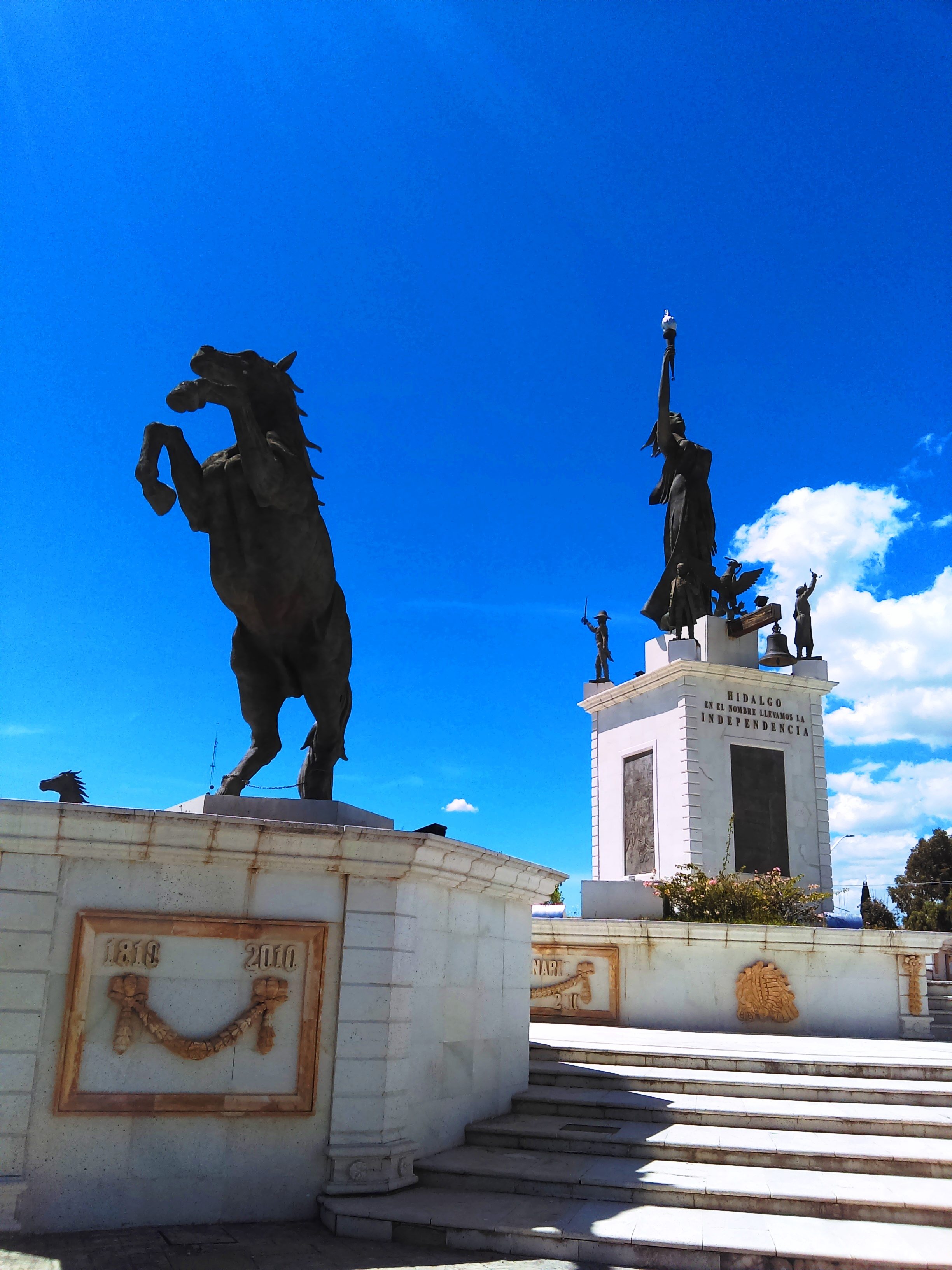 Monumento la Victoria del Viento. 031.jpg